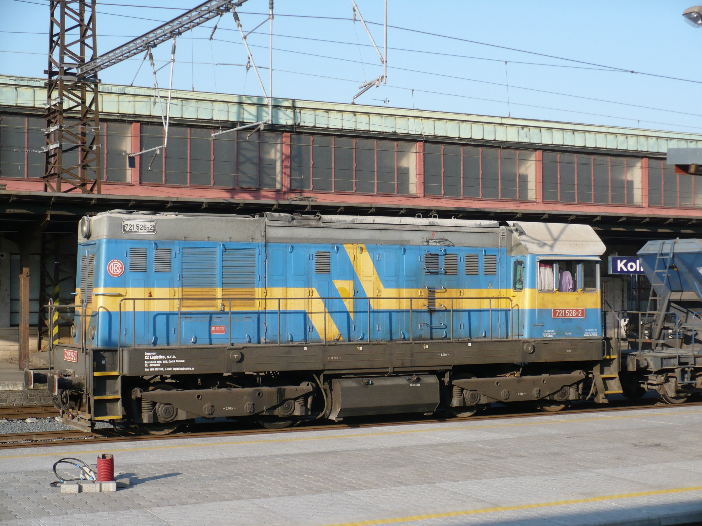 Motorová lokomotiva 721.526 držitele CZ Logistics, s.r.o., Česká Třebová, v žst. Kolín